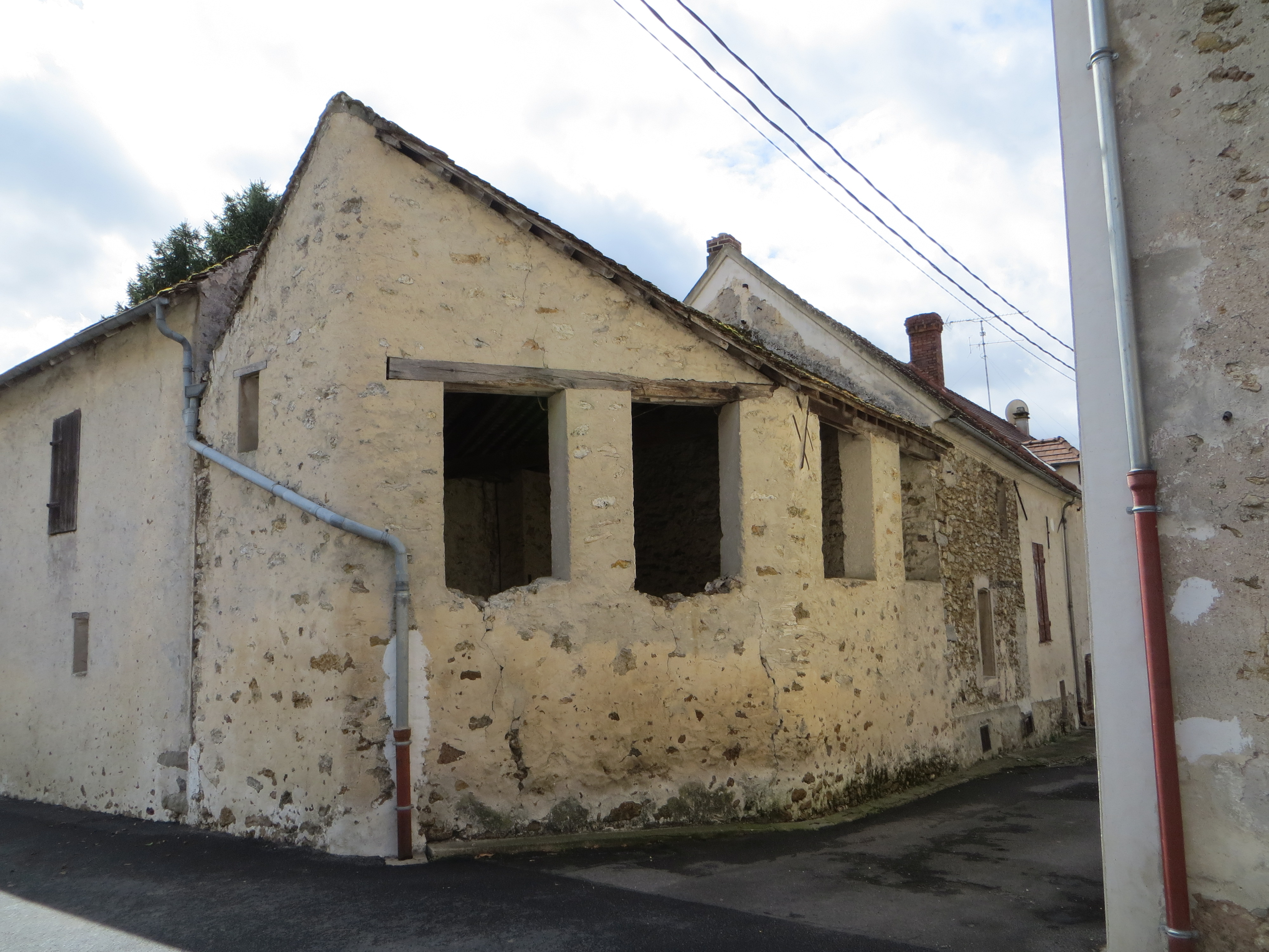 Local de stockage des bûches